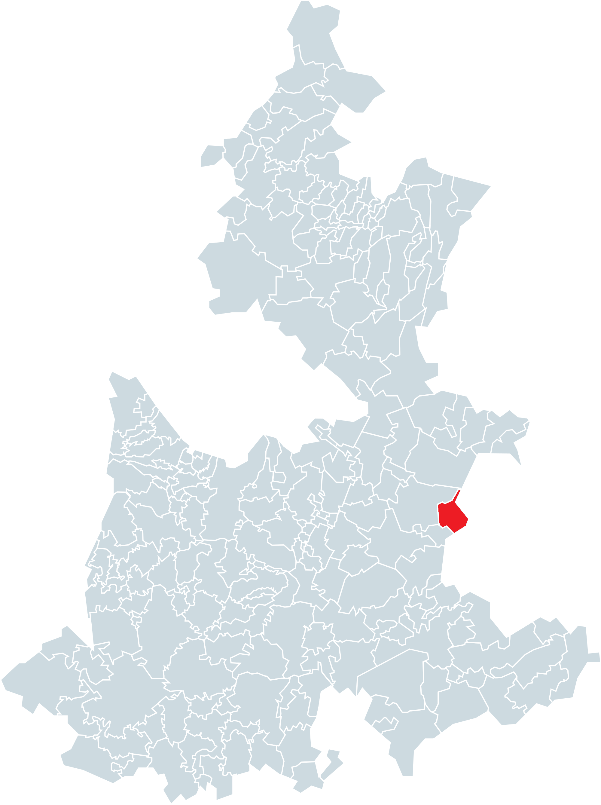 Municipio de Atzinzintla